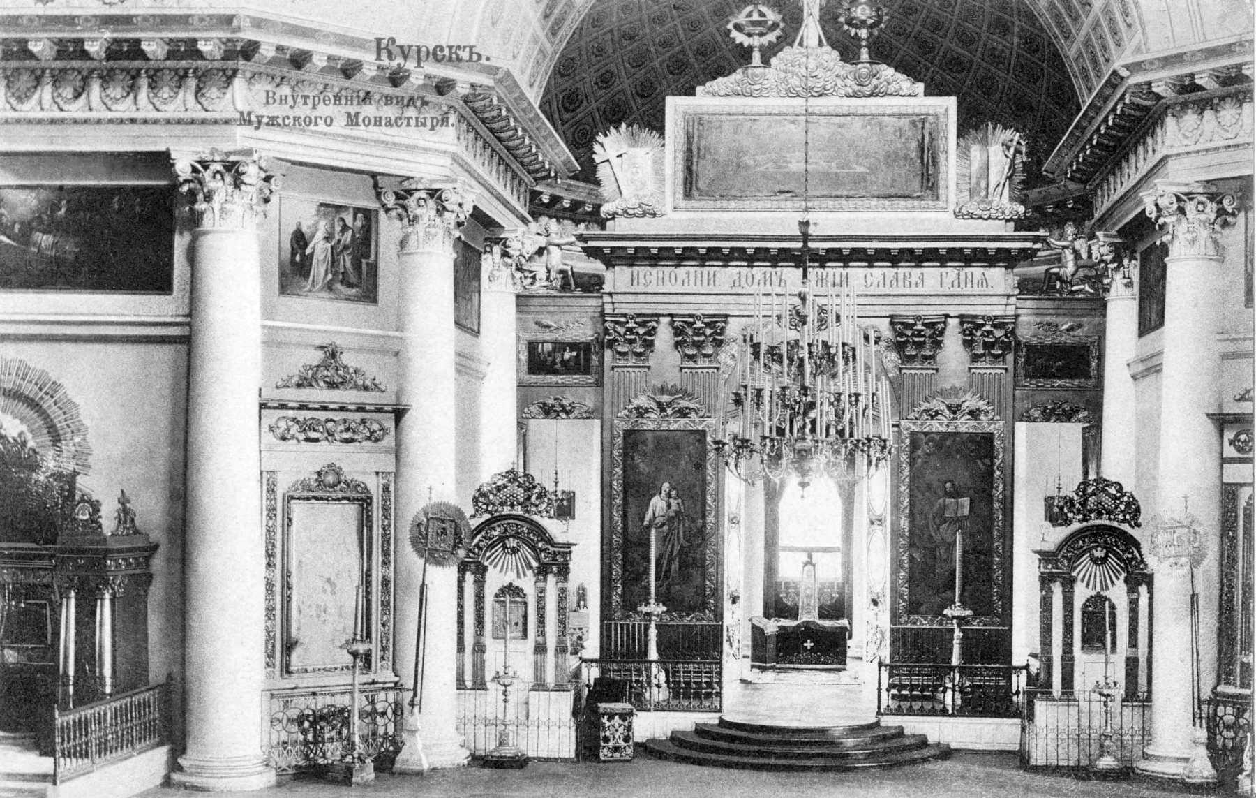 Внутренний вид Знаменского собора Курска в сторону алтаря. Слева часть северного придела с сенью для Курской Коренной иконы Божией Матери «Знамение»